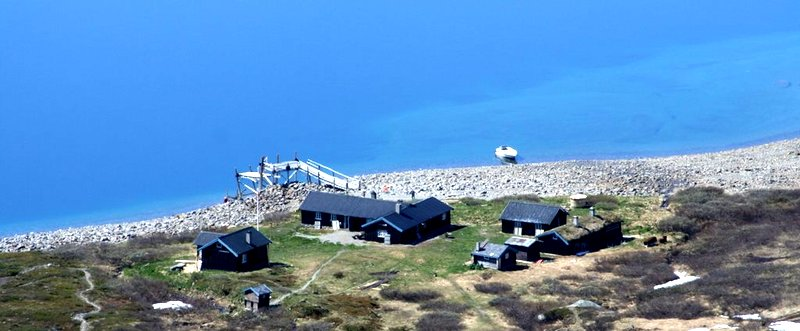 Torfinnsbu sett ovenfra